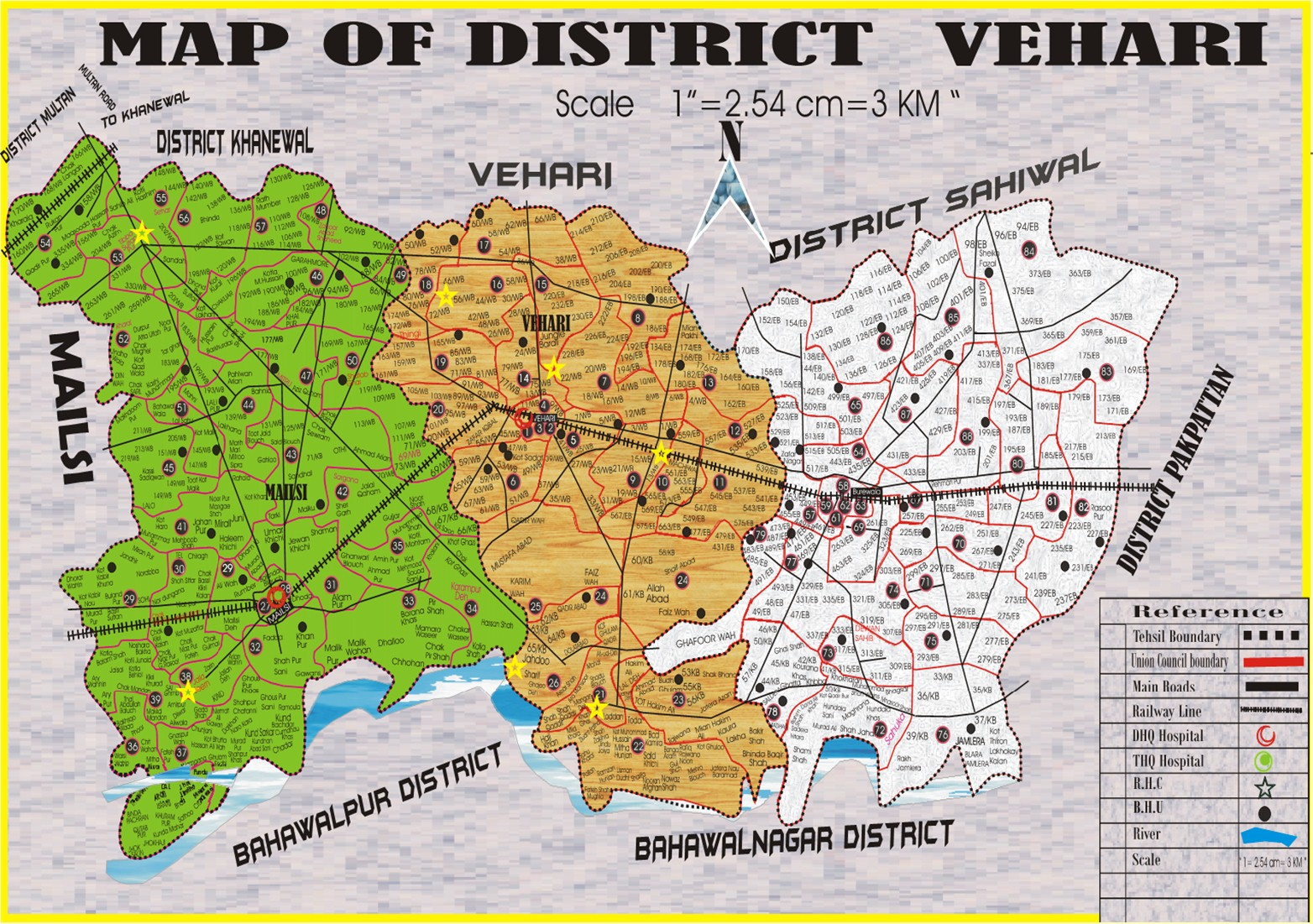 پنجابی: ضلع وہاڑی دے پنڈاں دا نقشہ